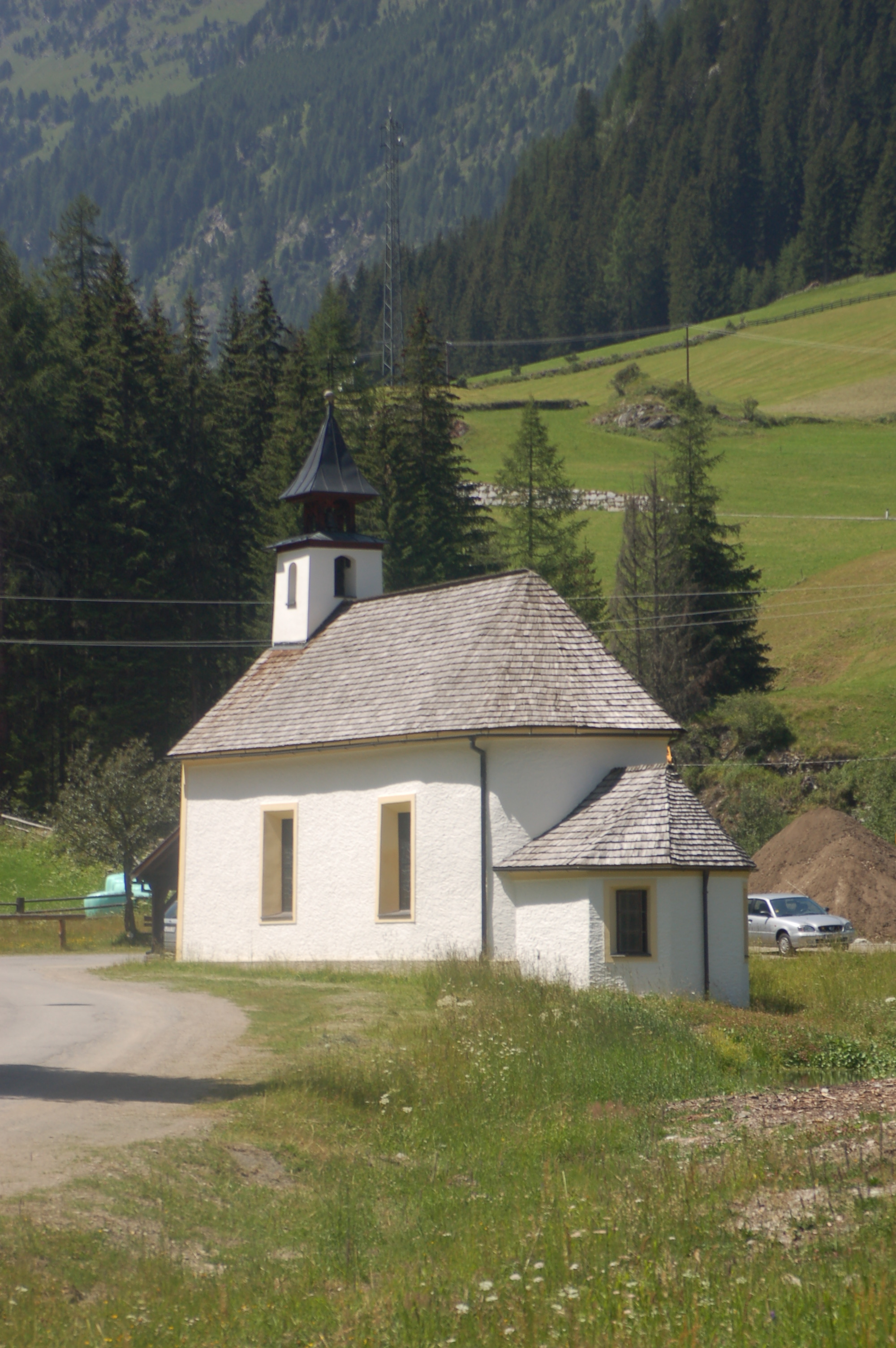 Kapelle Maria Hilf in der Gemeinde St. Jakob in Defereggen (Oberrotte)